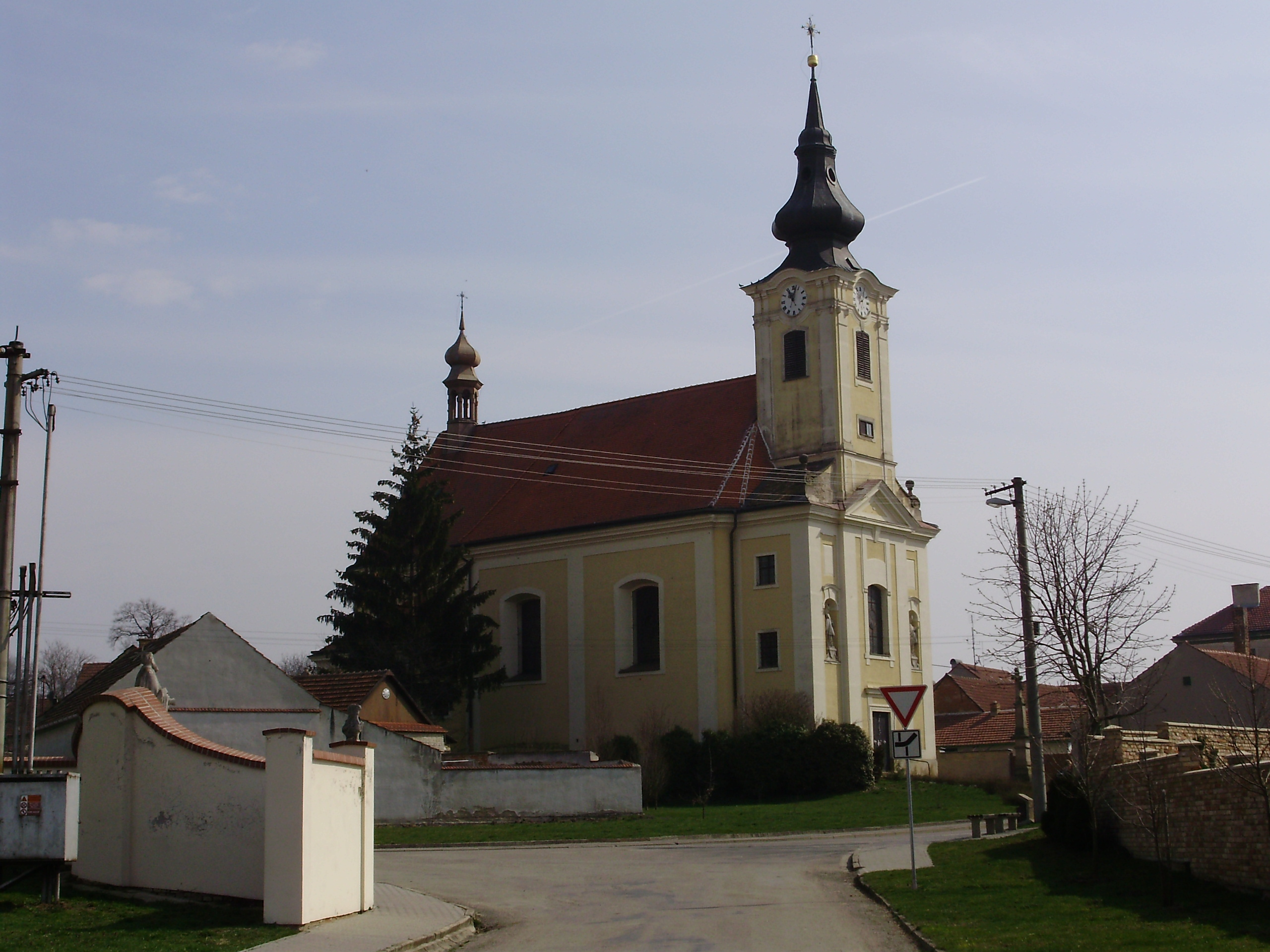 Farní kostel „Sv. Jakuba Většího a Matouše“